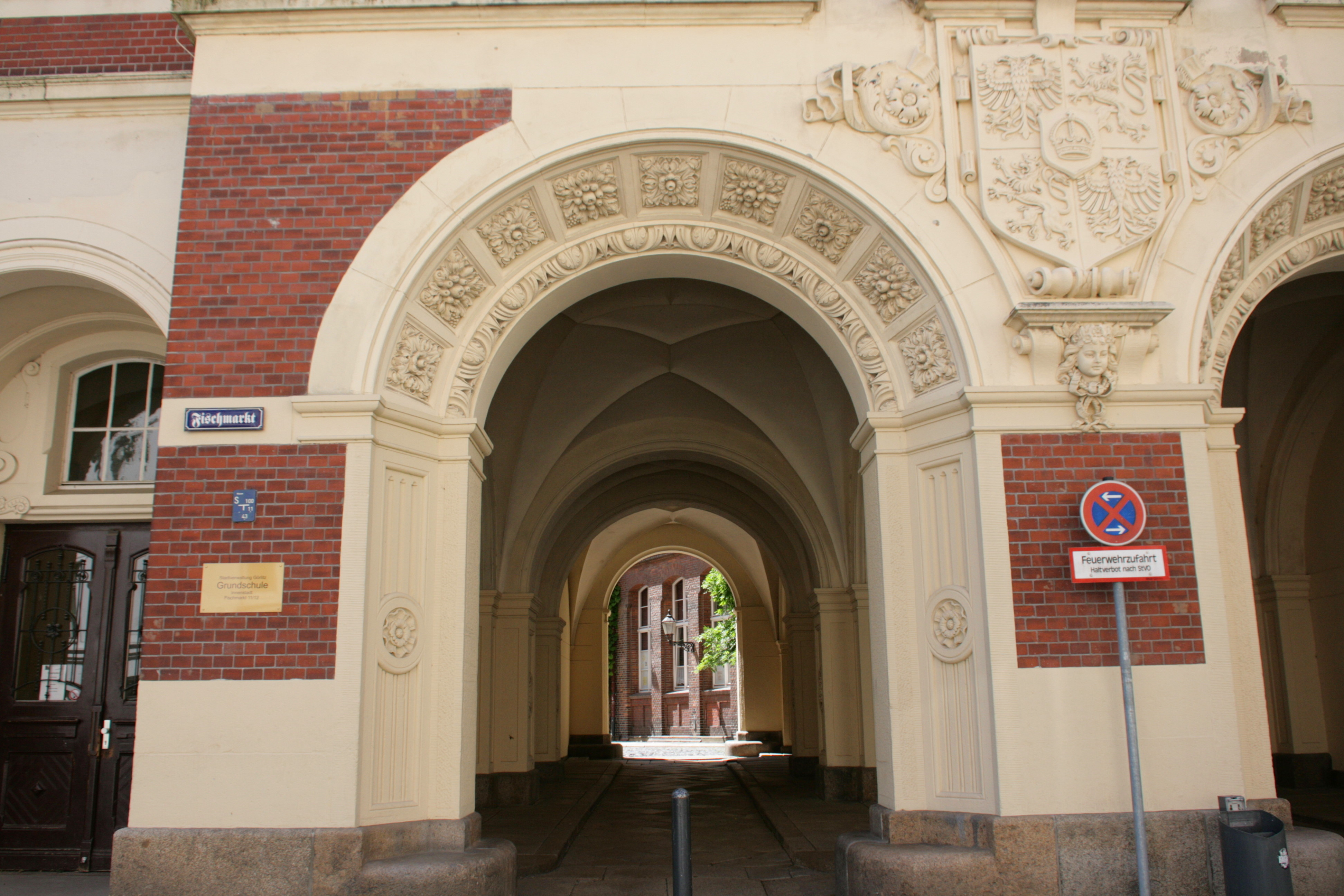 Grundschule Innenstadt, Fischmarkt in Görlitz